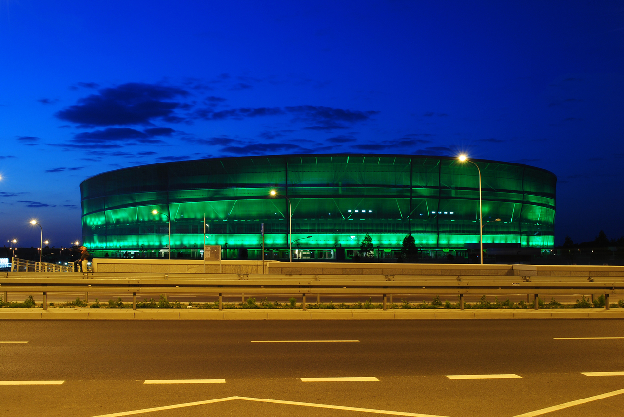 Stadion Miejski we Wroclawiu - testy iluminacj